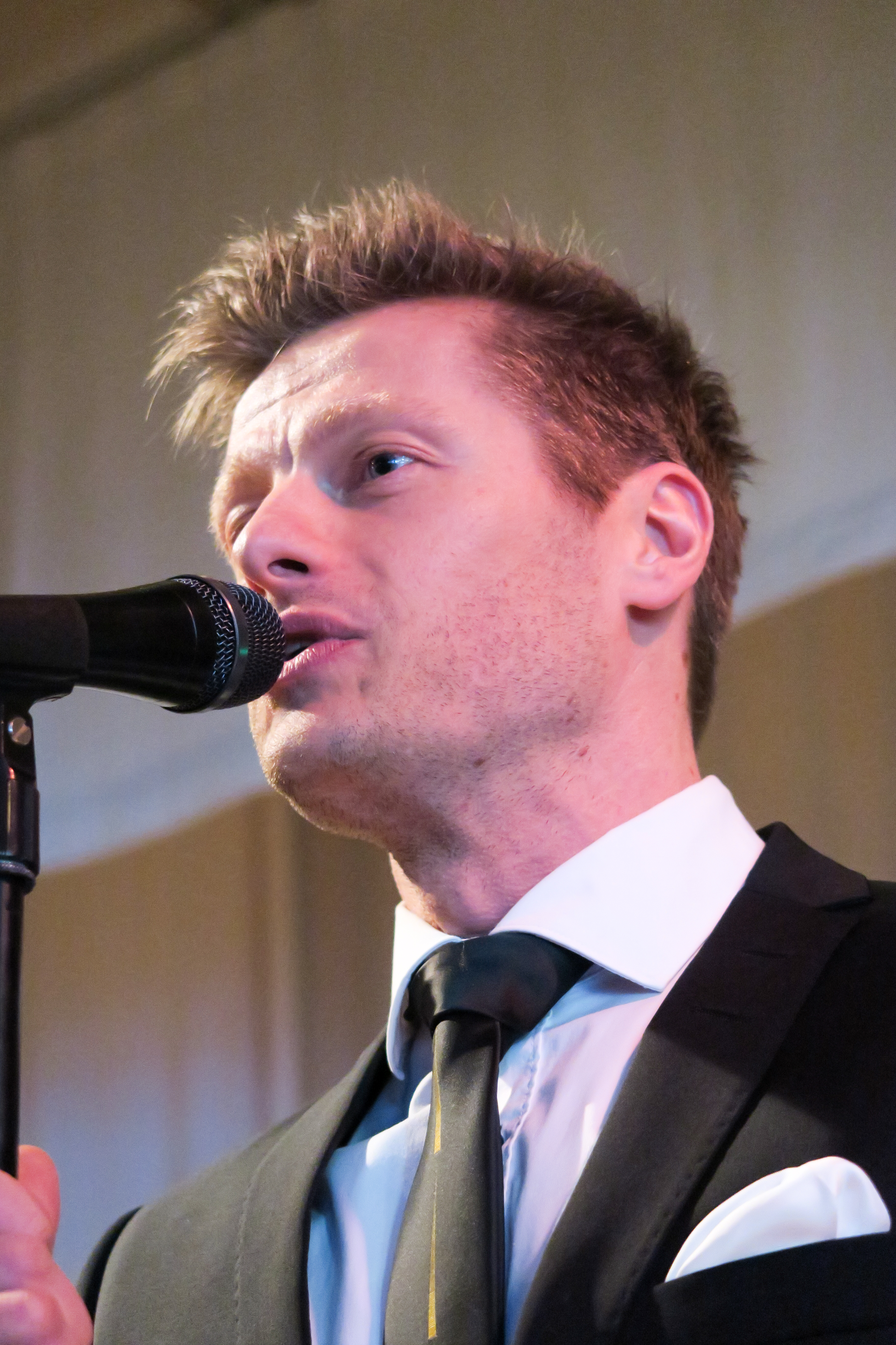 Petri Hervanto suomalainen laulaj